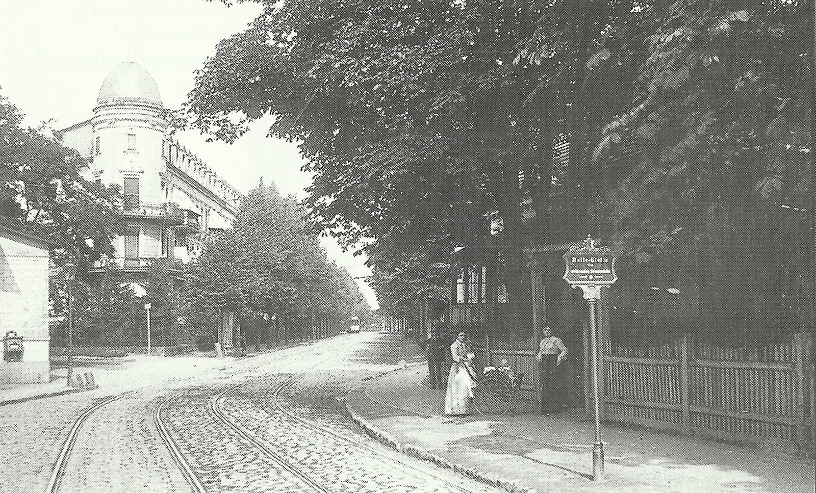 Blick in die Damerowstraße in Pankow um 1910